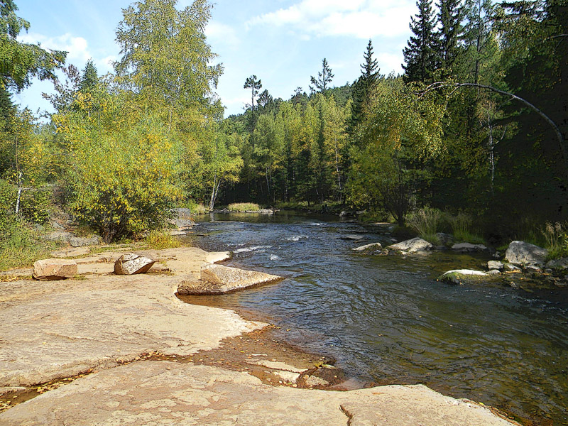 Олха в районе Огоньков.